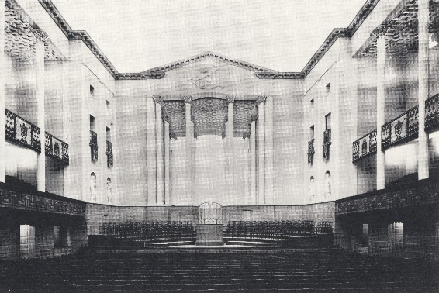 Konserthuset i Stockholm